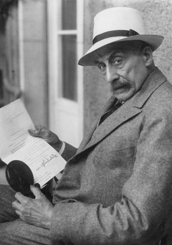 Professor Max Liebermann mit dem "Adlerschild" des Reiches! Dem Präsidenten der Preussischen Akademie der Künste, Professor Max Liebermann, wurde anlässlich der Feier seines 80sten Geburtstages eine Ehrengabe des Reichspräsidenten von Hindenburg, der "Adlerschild" des Reiches, sowie ein Handschreiben des Reichspräsidenten überreicht. Professor Max Liebermann mit der Ehrengabe des Reichspräsidenten, dem "Adlerschild" des Reiches.